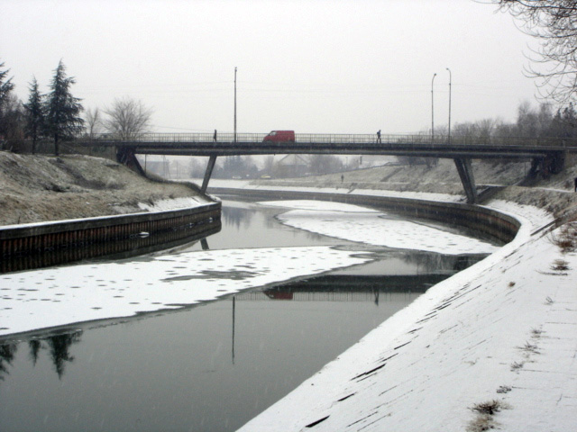 Begej River in Zrenjanin /Vojvodina /Serbia